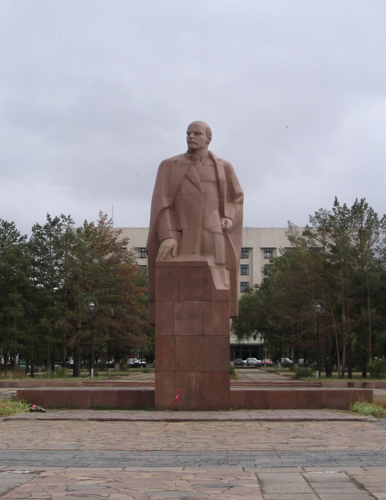 Памятник Ленину в Караганде на проспекте Бухар-Жырау (быв. Советский). На заднем плане офис Угольного департамента АО «АрселорМиттал Темиртау»